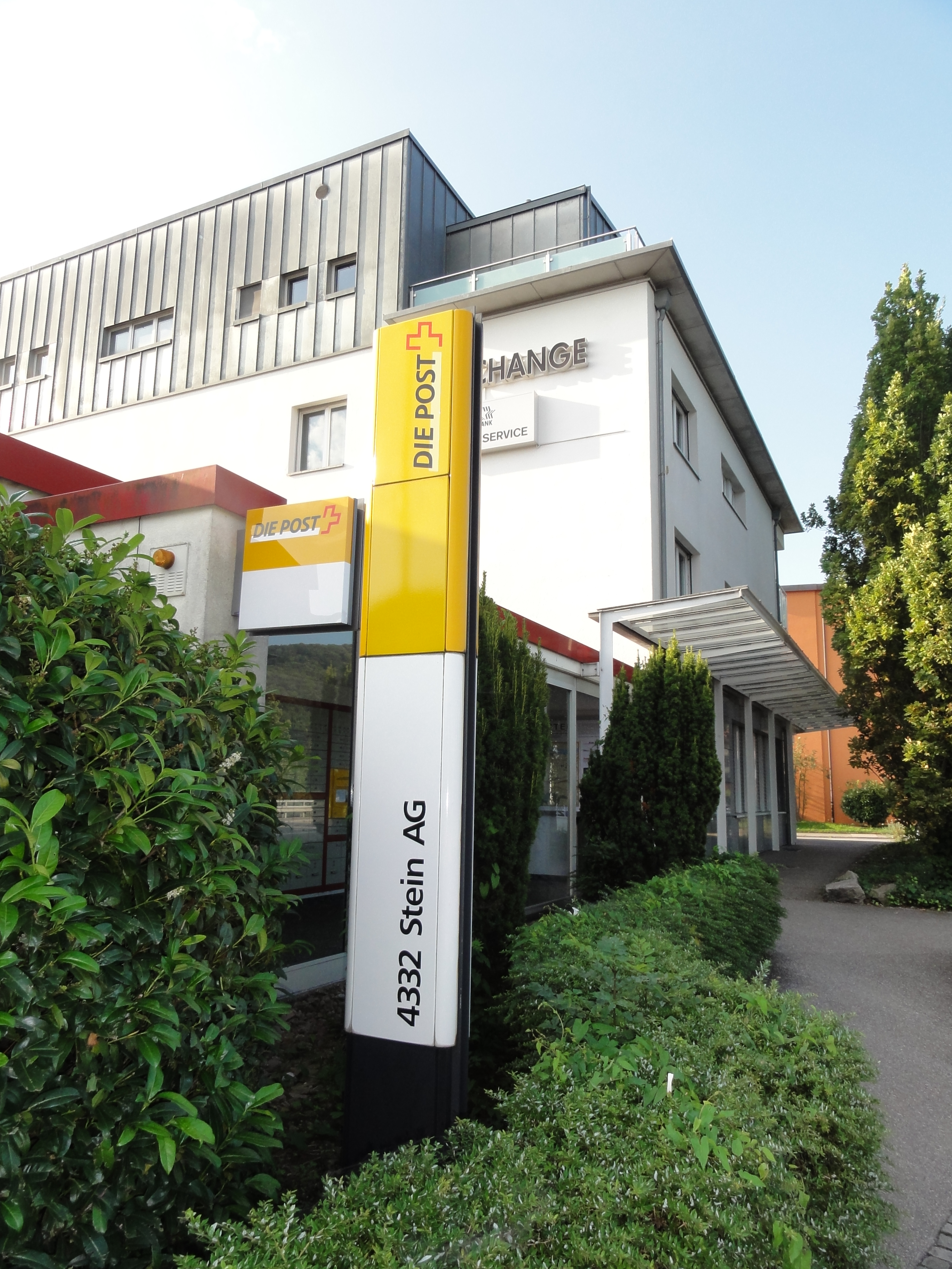 Stein, Aargau — Eingang zum Postamt und Schilder (u.a. "4332 Stein AG · Die Post".